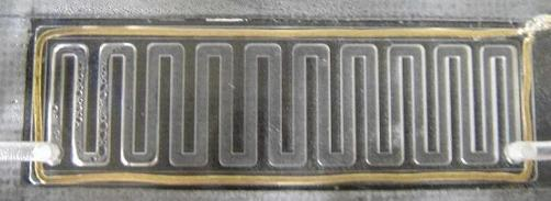 Water condensation in a fuel cell